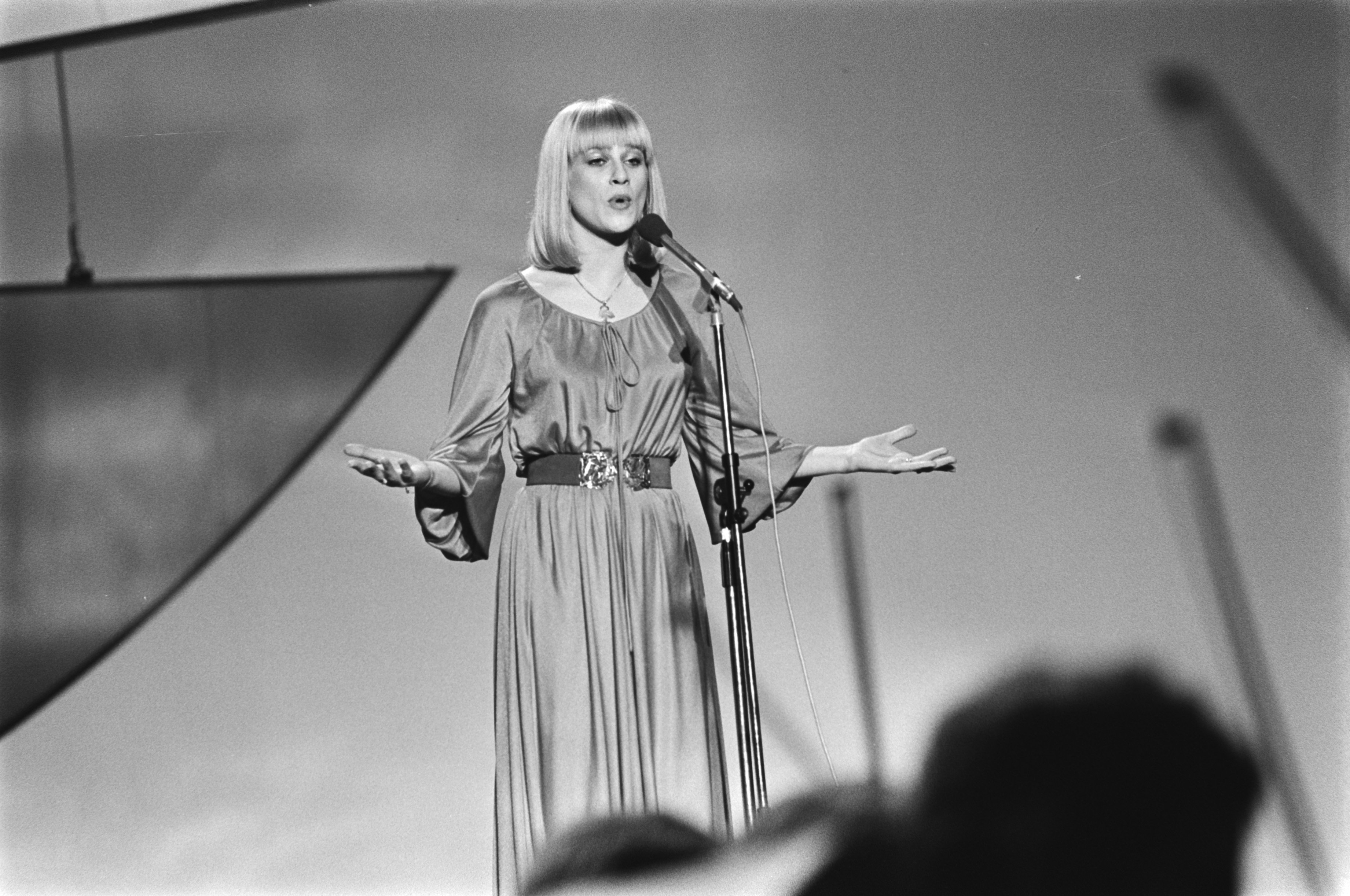 Collectie / Archief : Fotocollectie Anefo Reportage / Serie : [ onbekend ] Beschrijving : Eurovisie Songfestival 76 Den Haag ; Catherine Ferry (Frankrijk) Datum : 3 april 1976 Locatie : Den Haag, Frankrijk Trefwoorden : songfestivals Persoonsnaam : Eurovisie Songfestival Fotograaf : Mieremet, Rob / Anefo Auteursrechthebbende : Nationaal Archief Materiaalsoort : Negatief (zwart/wit) Nummer archiefinventaris : bekijk toegang 2.24.01.05 Bestanddeelnummer : 928-5017